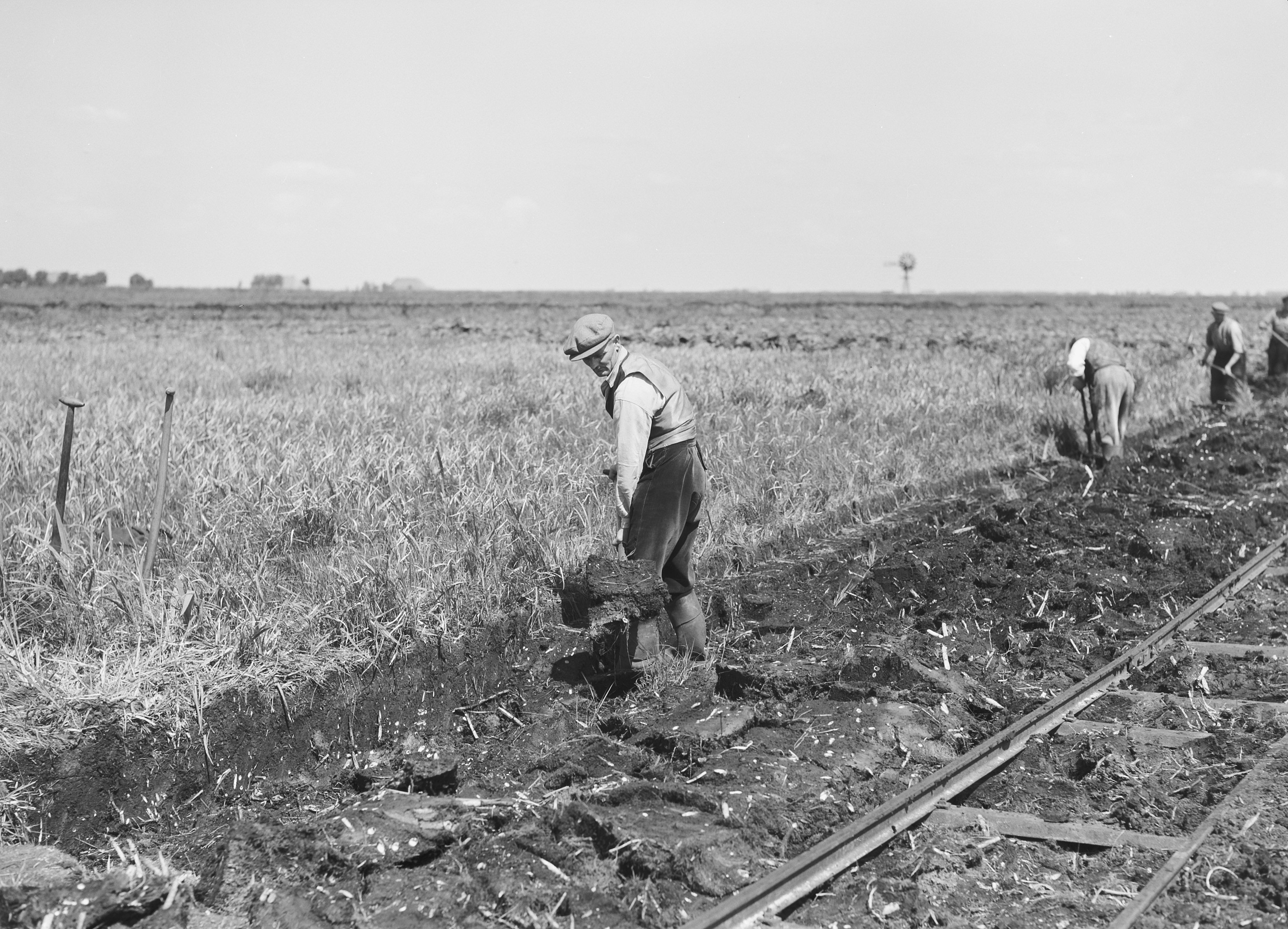 Collectie / Archief : Fotocollectie Nederlandse Heidemaatschappij Reportage / Serie : [ onbekend ] Beschrijving : ontginning, grondbewerking, egaliseren, bezanden, arbeiders, Haskerveenpolder Datum : ongedateerd Locatie : Haskerveenpolder Trefwoorden : arbeiders, bezanden, egaliseren, grondbewerking, ontginning Instellingsnaam : Drie Provinciën, De Fotograaf : [onbekend] Auteursrechthebbende : Nationaal Archief Materiaalsoort : Negatief (zwart/wit) Nummer archiefinventaris : bekijk toegang 2.24.06.02 Bestanddeelnummer : 159-0022